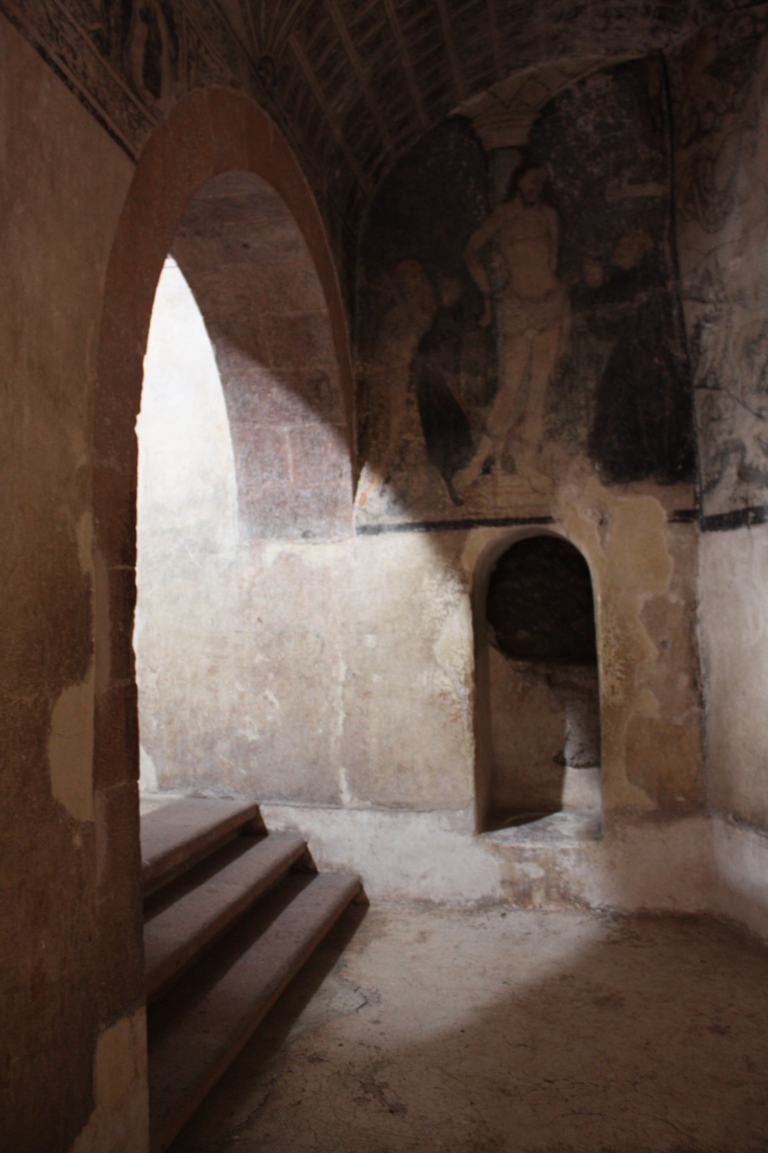 Convento de Actopan